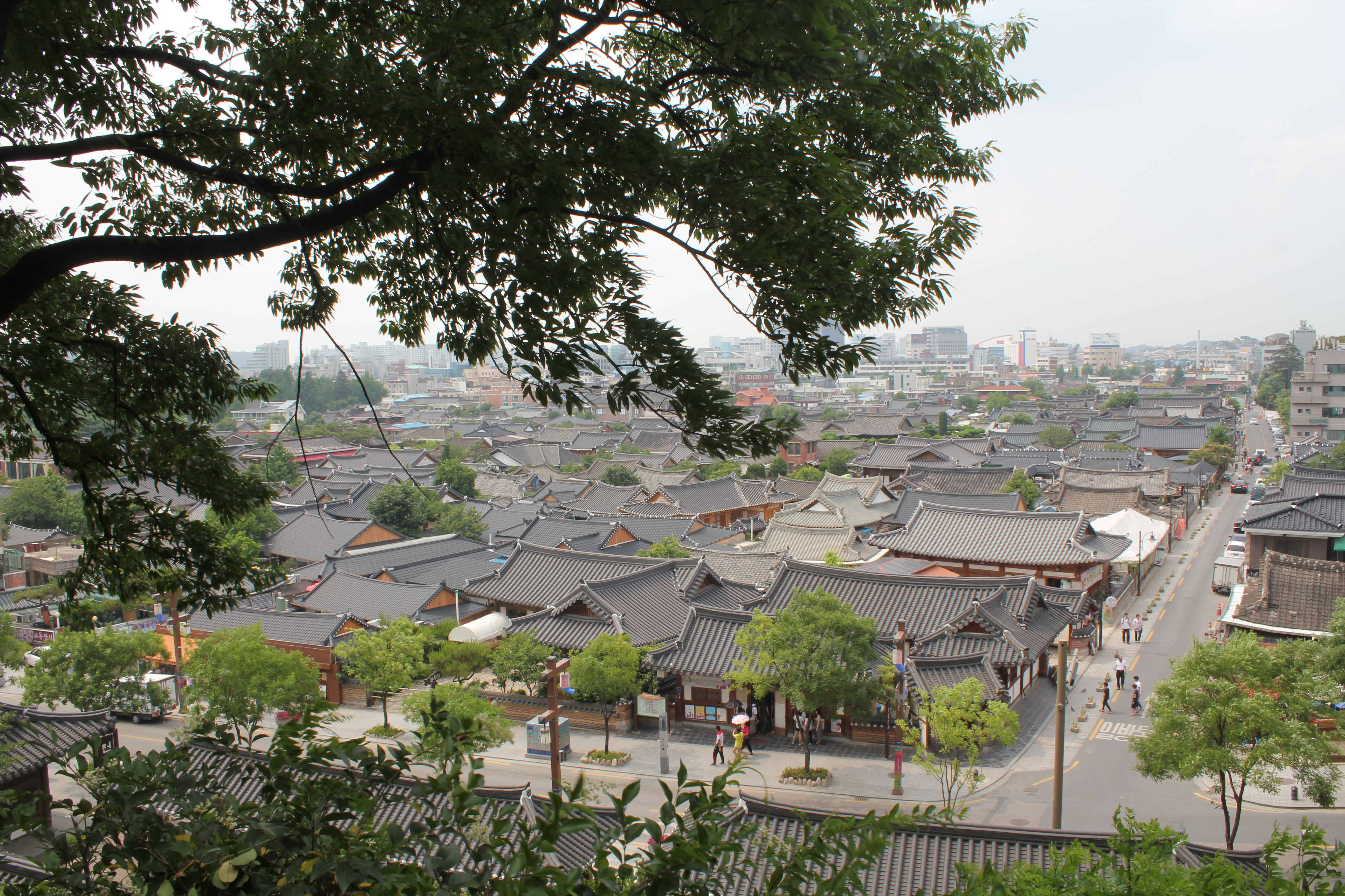 전주한옥마을